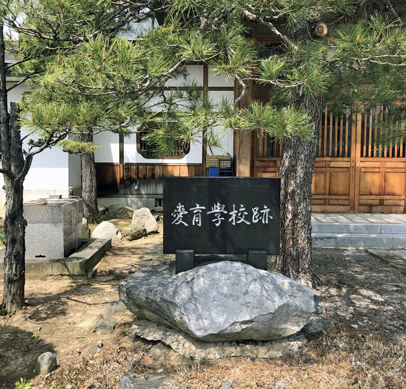 明徳寺愛育学校跡の碑